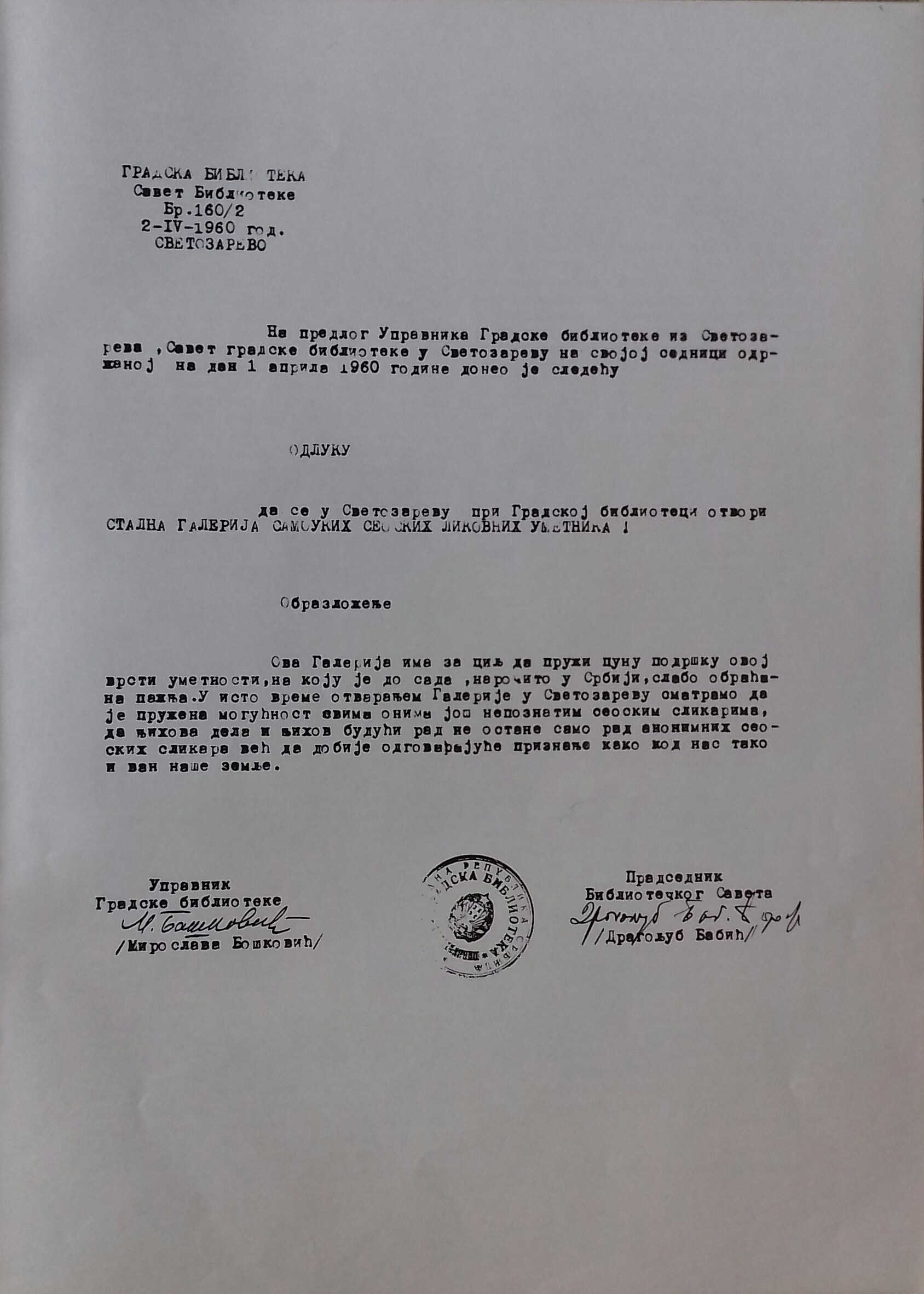 Српски (ћирилица): Odluka o osnivanju MNMU, od dana 2. aprila 1960. godine